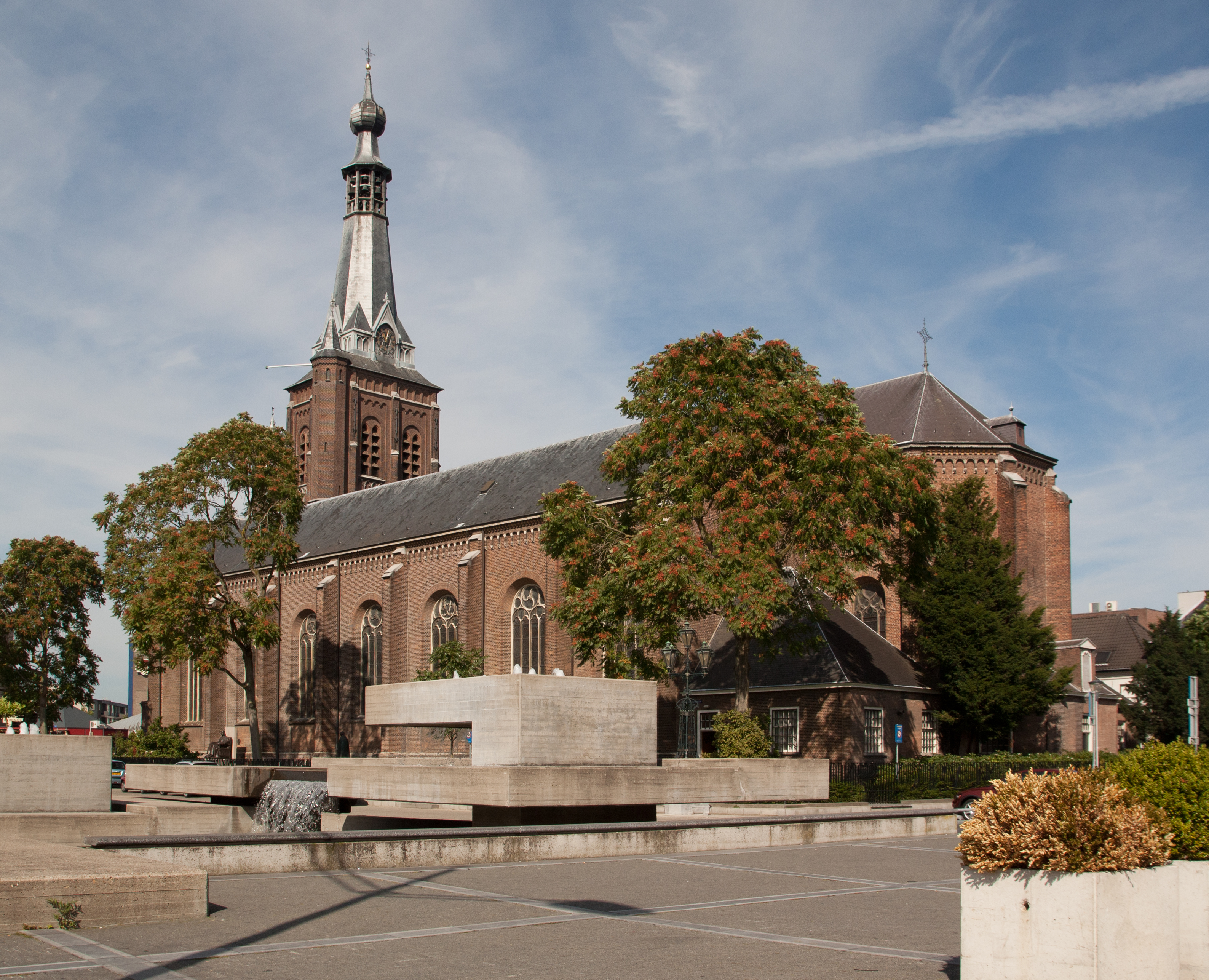 Heikesekerk, Tilburg